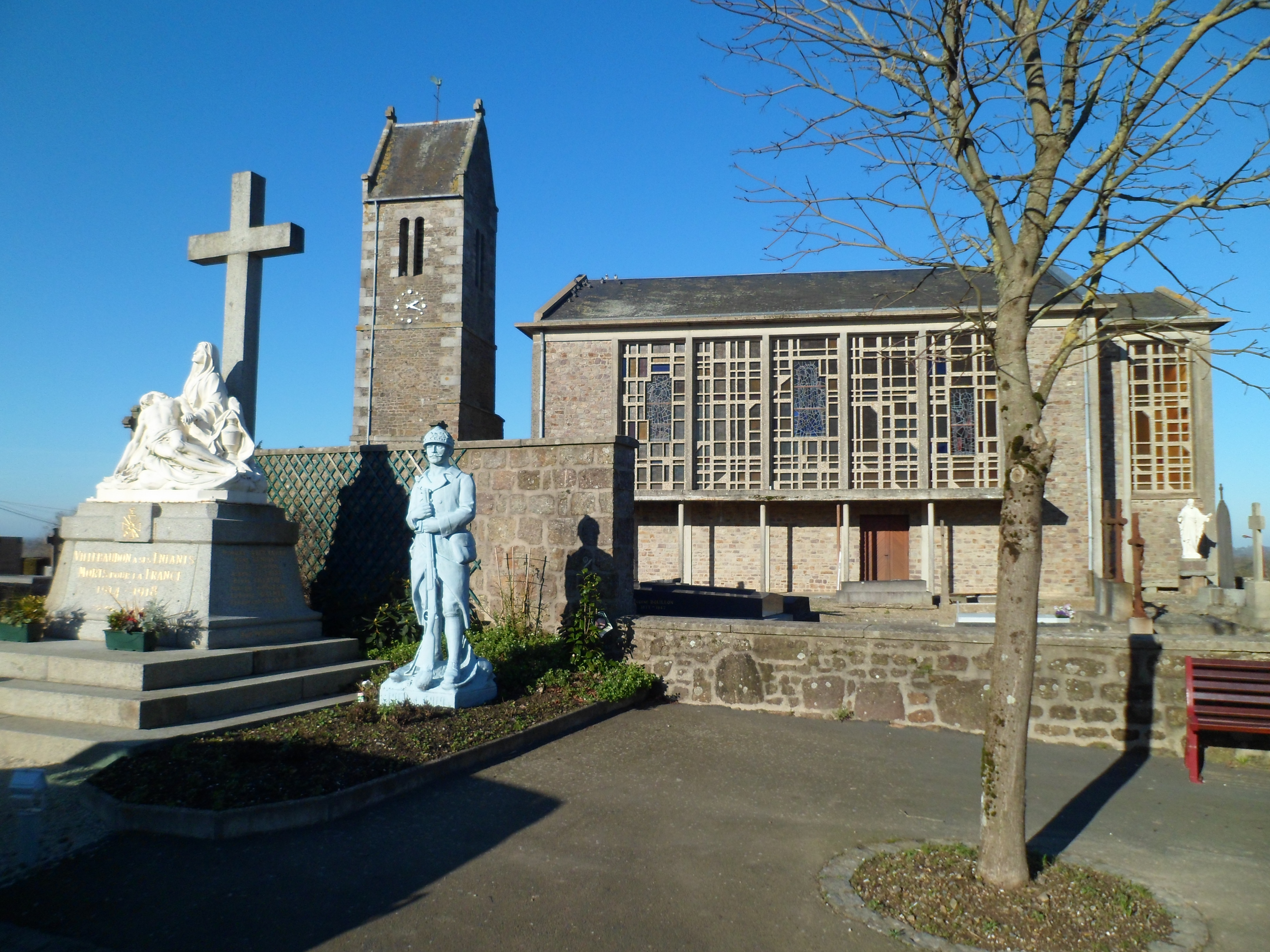 Église Sainte-Anne de Villebaudon